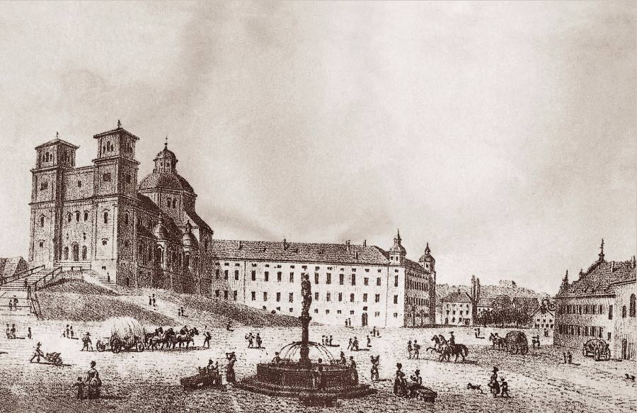 Hildegardplatz Kempten